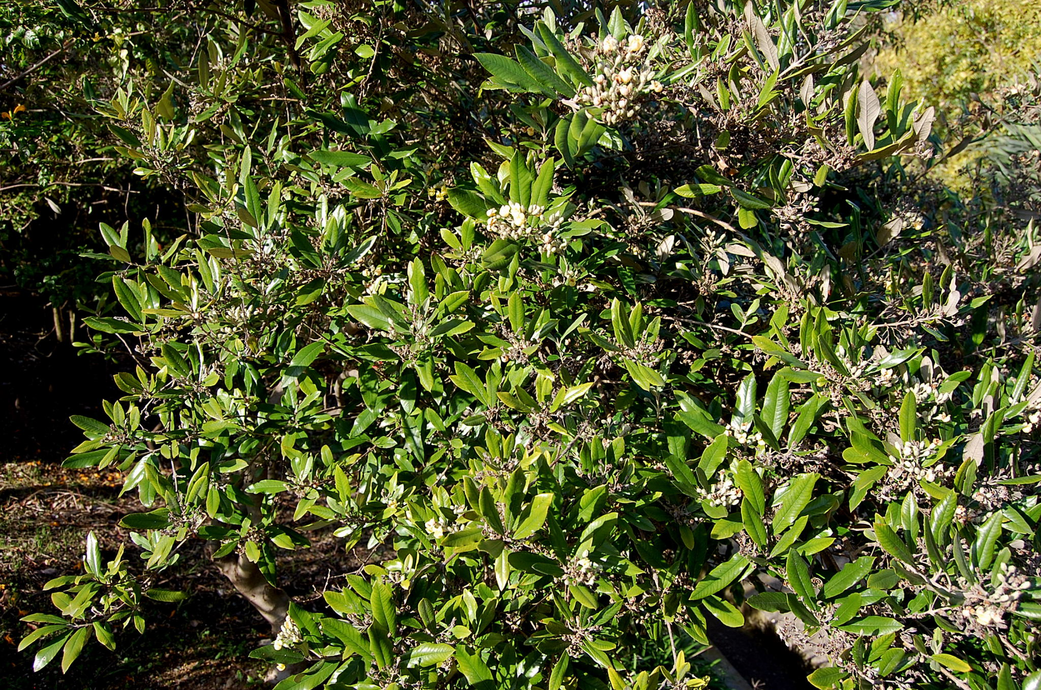 Anastrabe integerrima al Jardí Botànic de Barcelona.